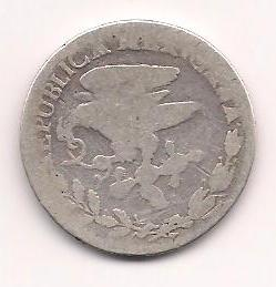 La primera vez que el águila del Escudo Nacional de México fué representado de perfil hacia la izquierda en las monedas mexicanas. Se acuñaron en plata monedas de 1/2, 1, 2 y 8 reales en Durango y la Ciudad de México.